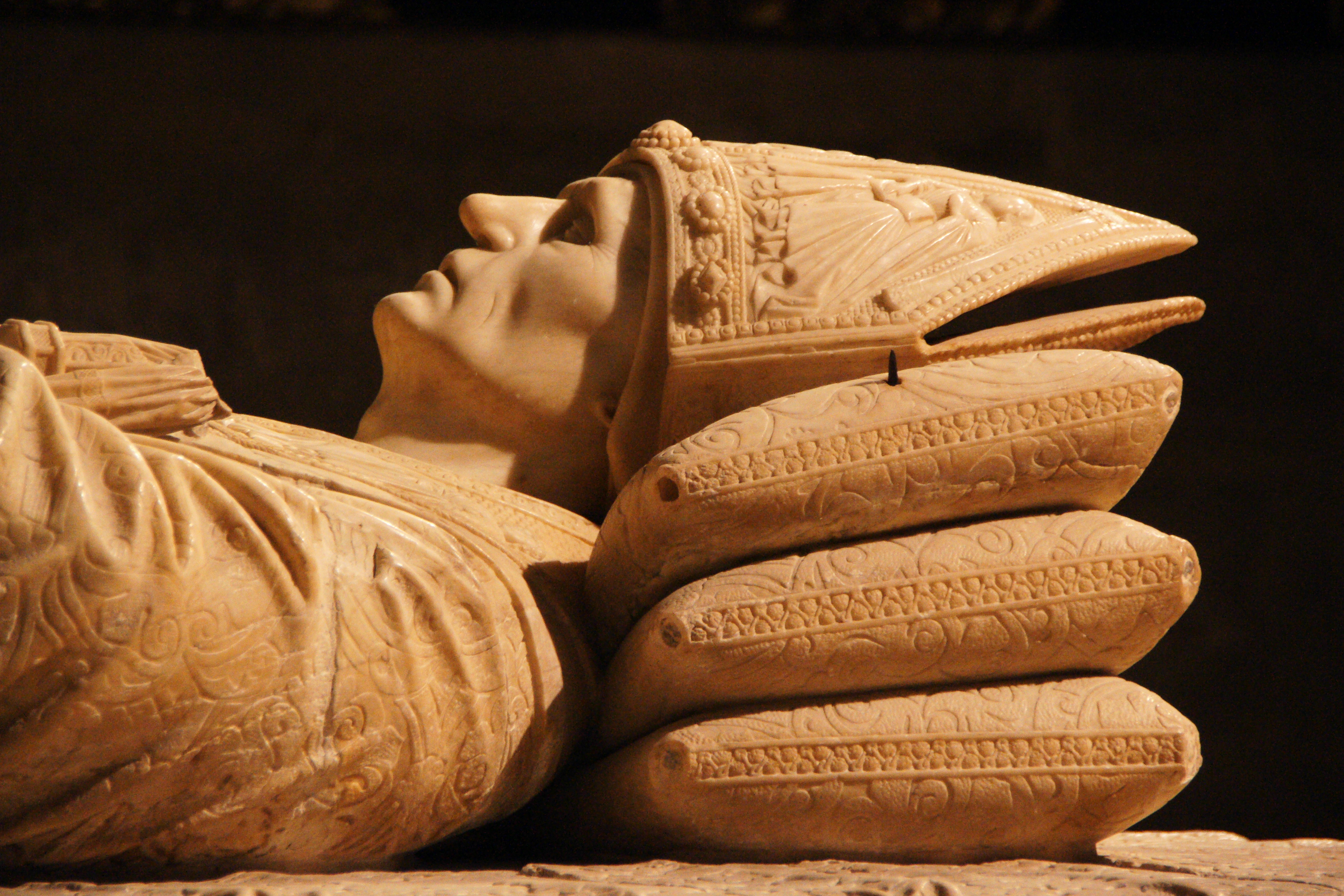 Detalle del sepulcro del cardenal Juan de Cervantes (1382-1453), que se halla en el interior de la capilla de San Hermenegildo de la catedral de Sevilla, (España).